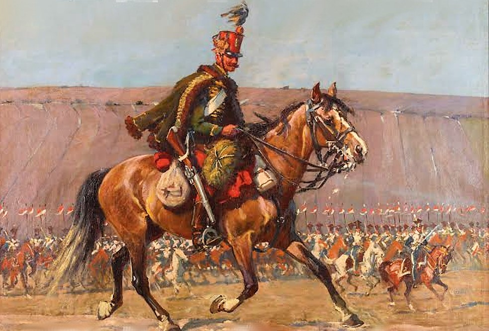 Huszár az Erdélyi Panoráma (Panorama Siedmiogrodzka) részlete